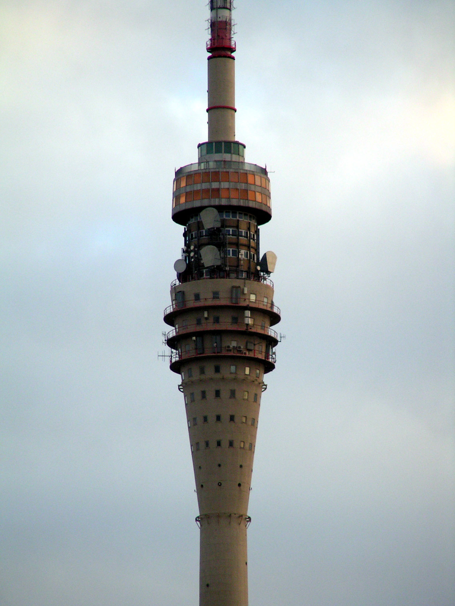 Dresden Fernsehturm Detailansicht, Germany